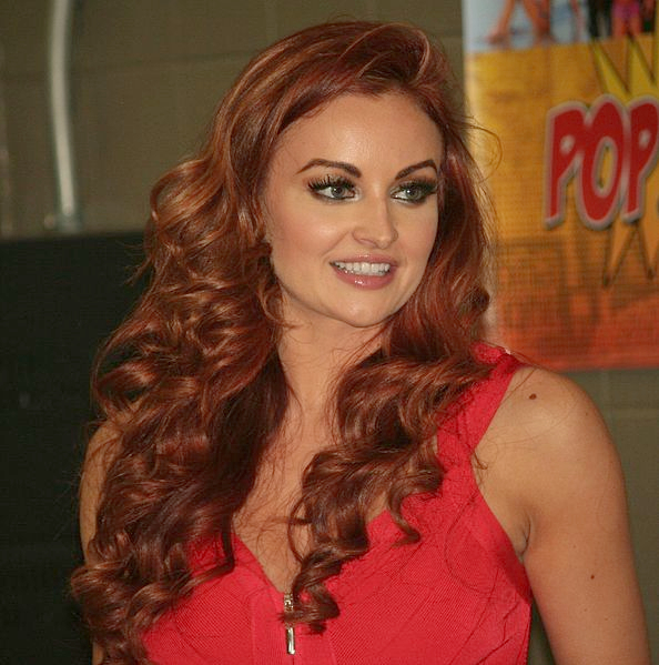 Maria Kanellis en avril 2016 durant l'Evansville Pocorn (une convention de fans de science fiction).